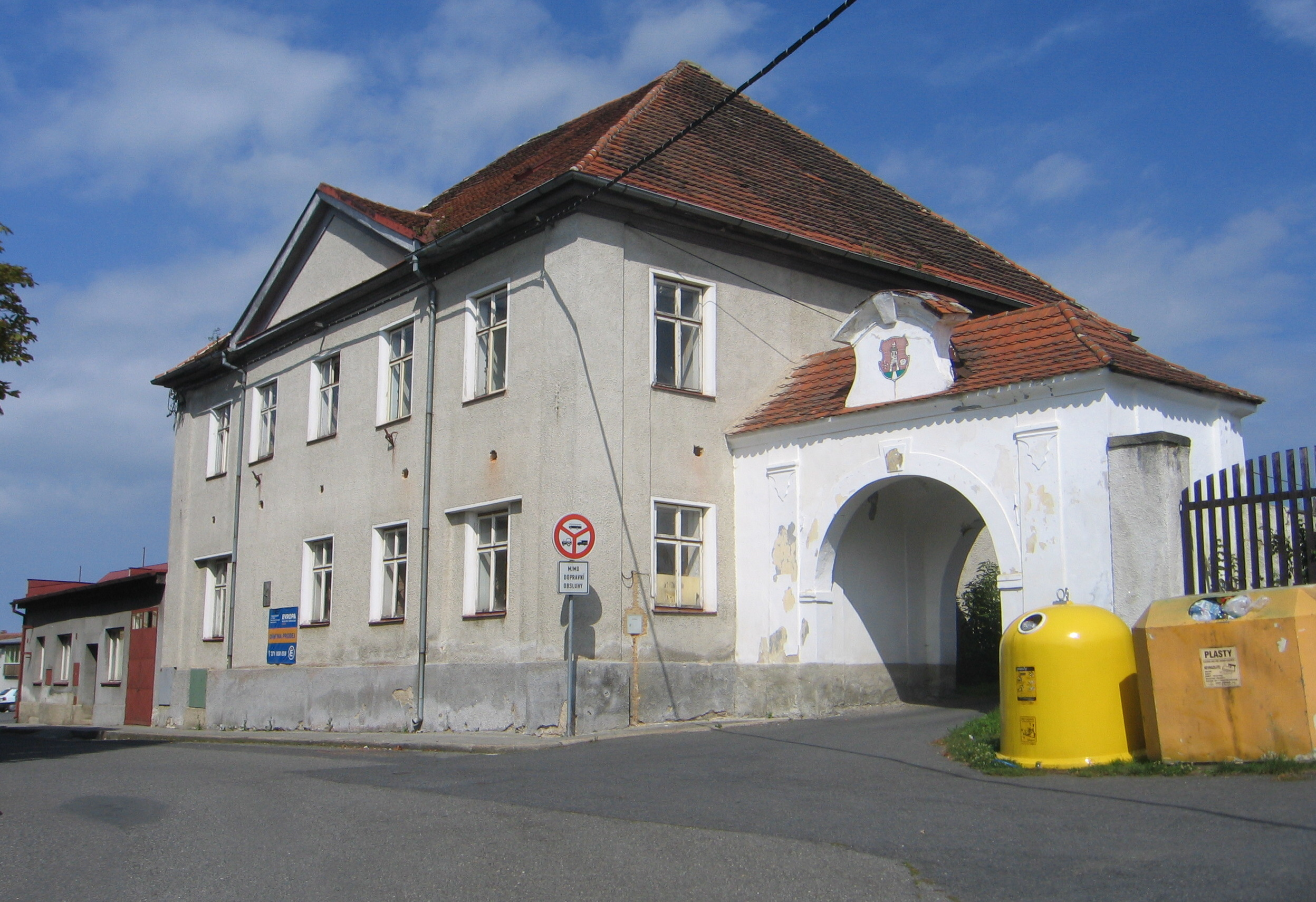 Zámek Plánice, Plánice 1